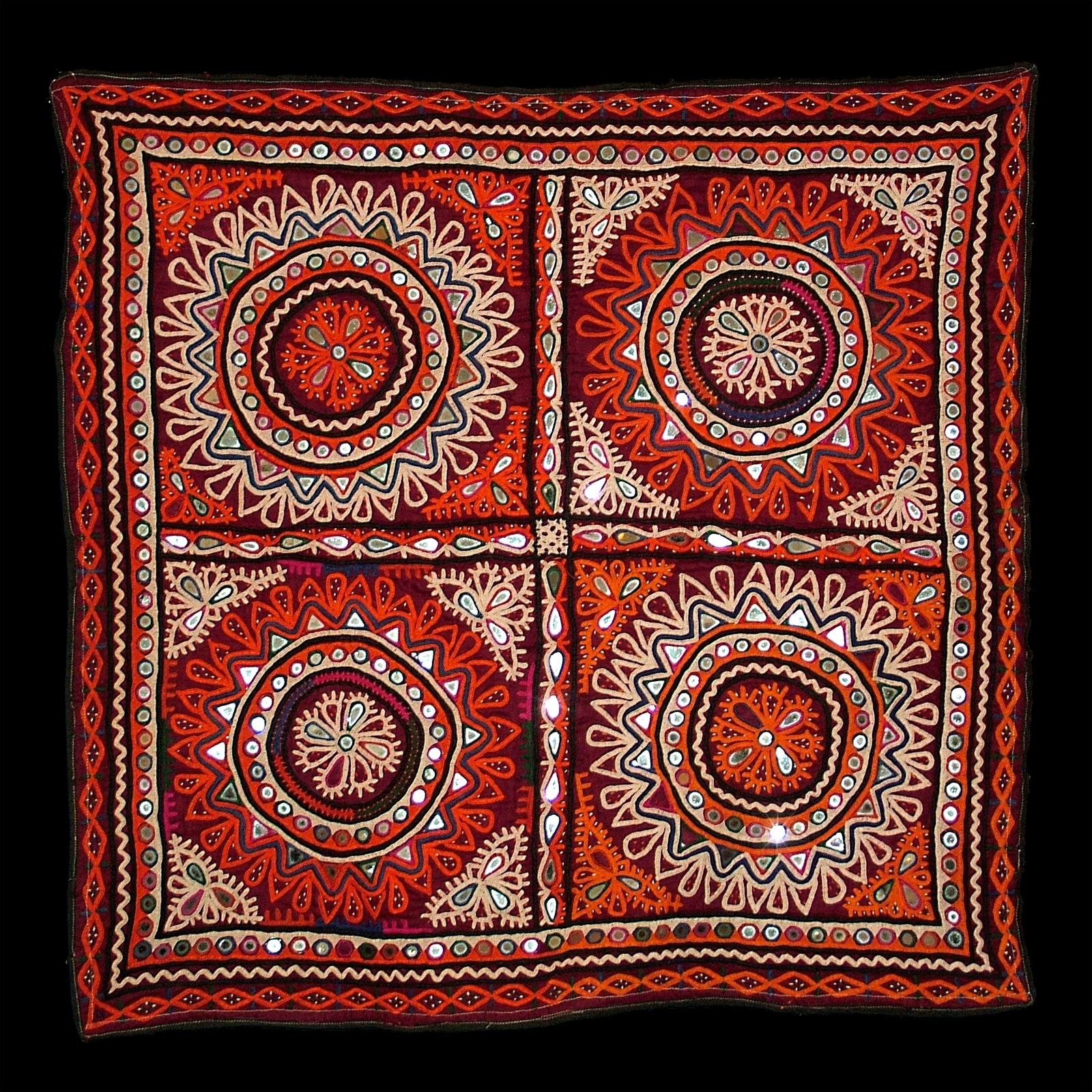 Schweres, besticktes Tuch der Meqwar (Kutch Distrikt, Indien), verziert mit zahlreichen kleinen Spiegelscherben, ca. 50 cm x 50 cm. Foto: Leander Seige, 2006, fotografiert fuer , GNU FDL